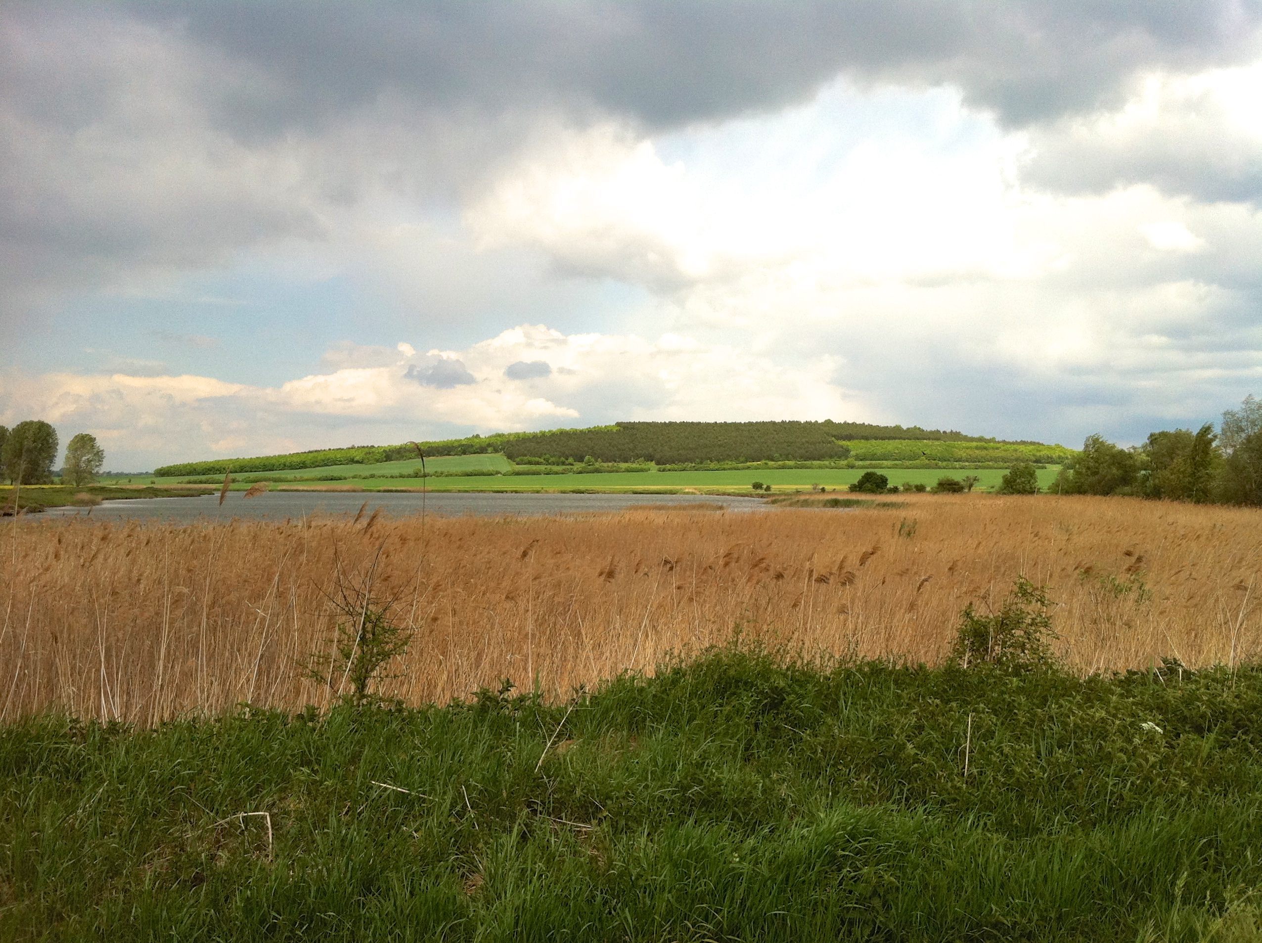 Dieser kleine See/Weiher liegt rückwärtig unterhalb der Mühlburg (Drei Gleichen) im Naturschutzgebiet „Schloßleite“ (NSG 333), umgeben vom Landschaftsschutzgebiet „Dreigleichen“ (LSG 26).